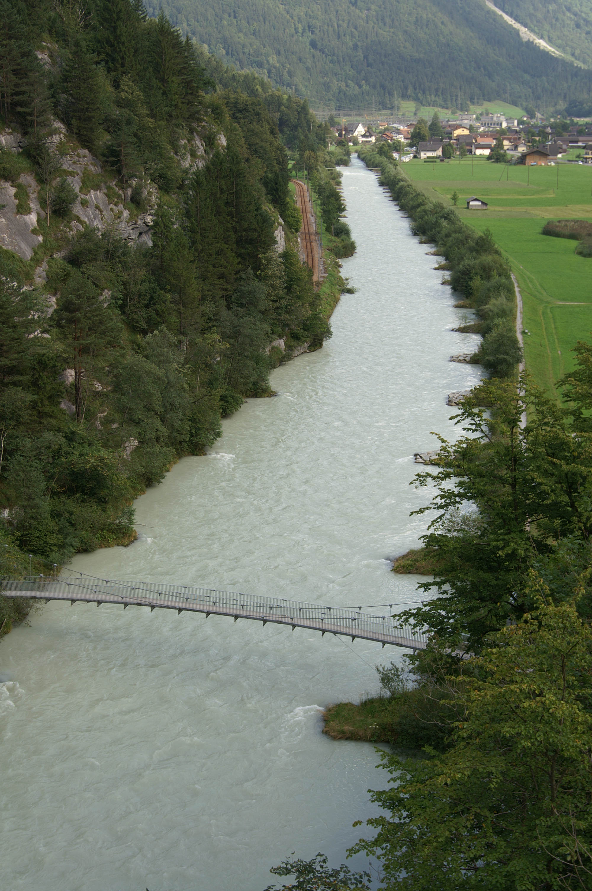 L'Aar à Meiringen.